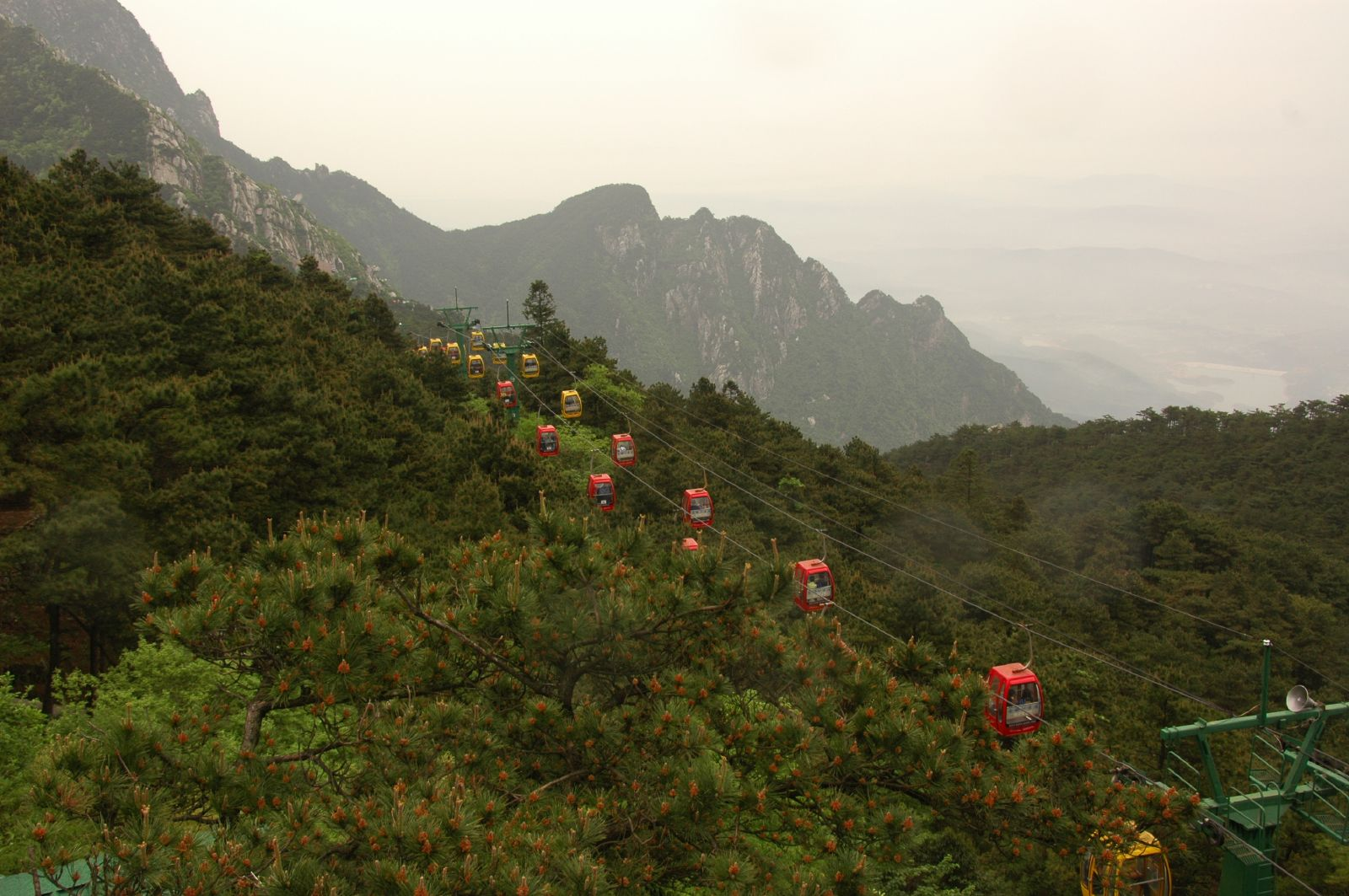 Lu Shan, Jiangxi, China